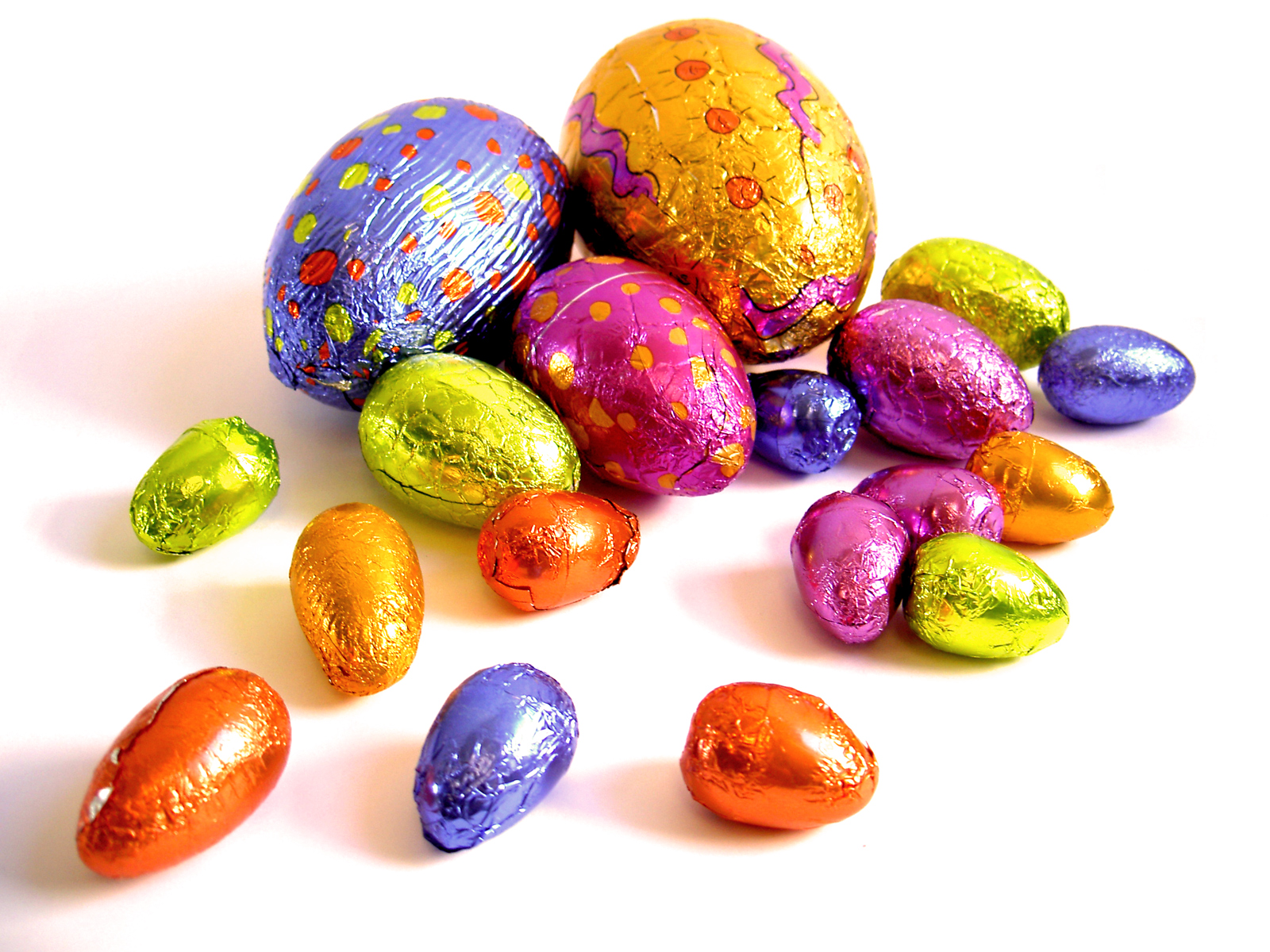 Easter eggs // Ostereier